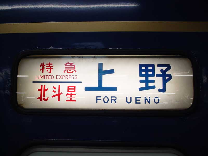 北斗星４号上野行方向幕